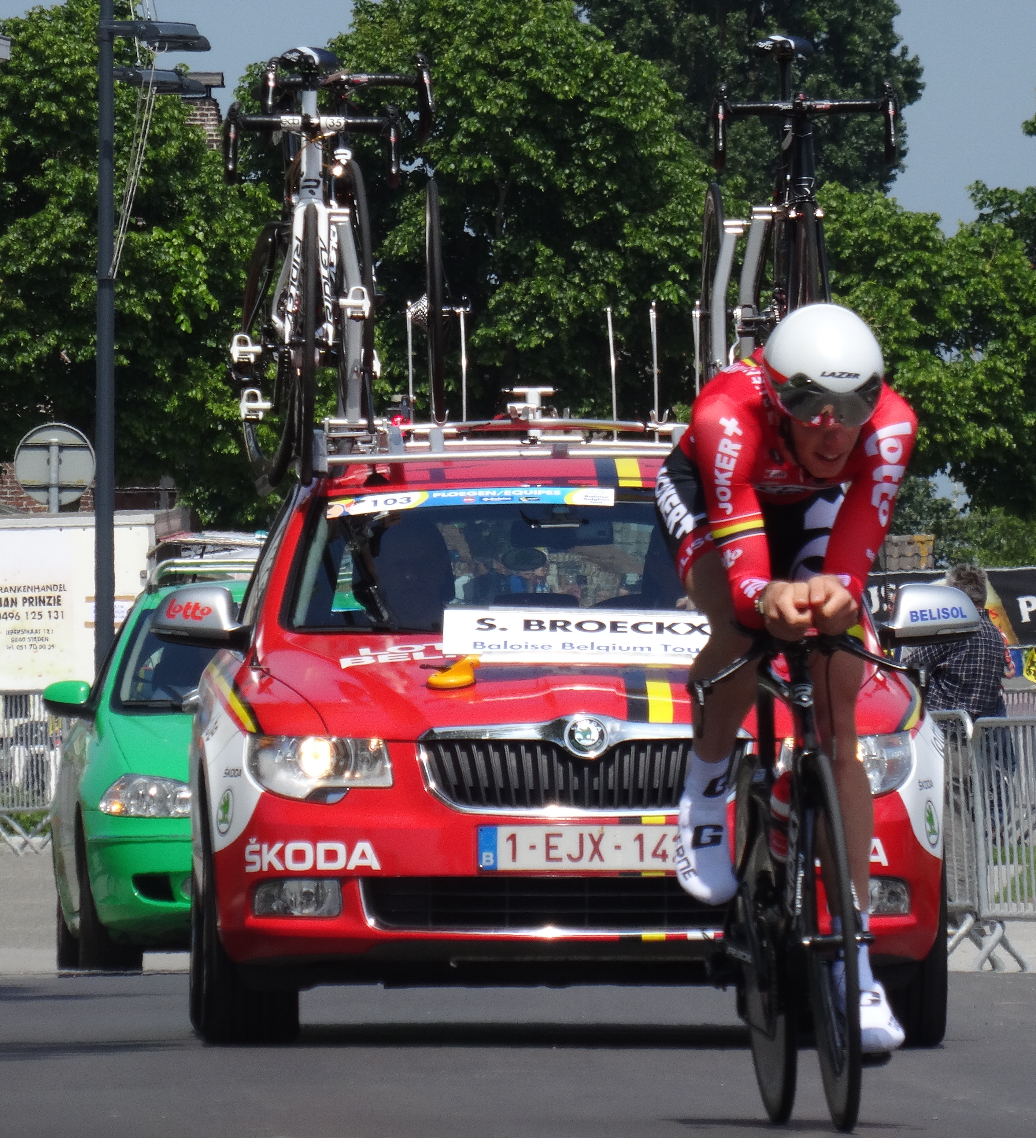 Reportage photographique réalisé le vendredi 30 mai à l'occasion du contre-la-montre individuel de la troisième étape du Tour de Belgique 2014 à Dixmude, Belgique.